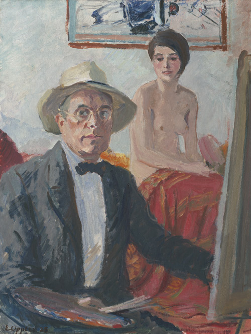 Selbstbildnis mit Modell: Lo und ich Öl auf Leinwand, 1928. 65,5 x 50 cm.